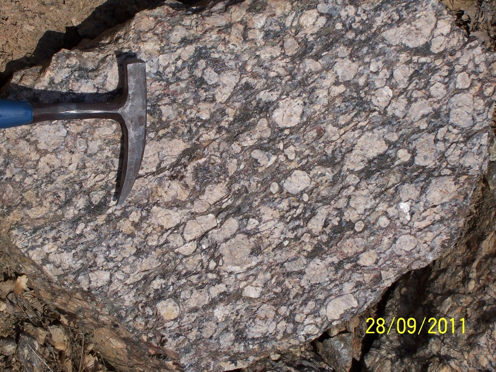 Aydın - Buharkent Gnays mostra